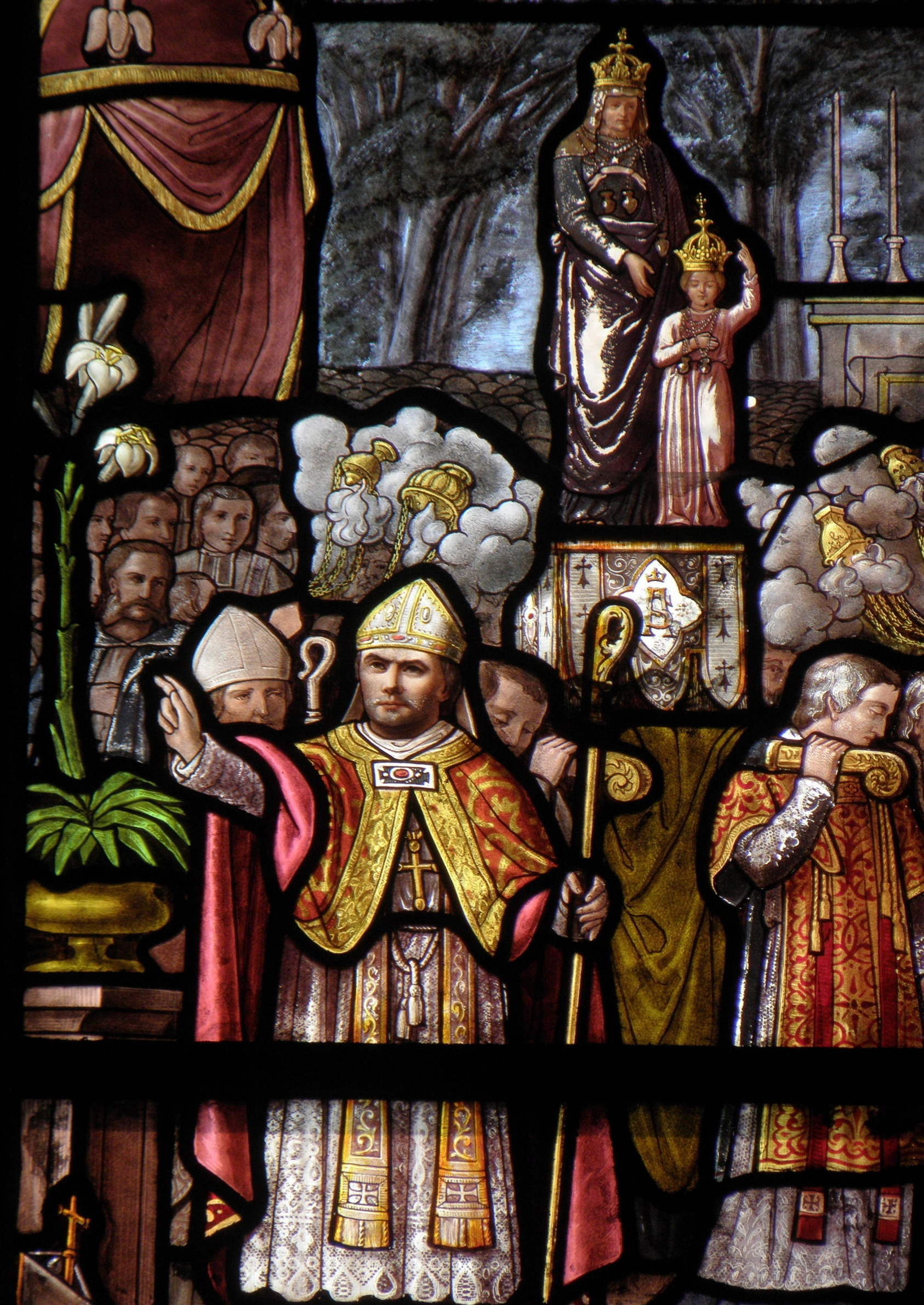 Baie 06 de la basilique Notre-Dame-du-Roncier de Josselin (56). Datation: 1875. Maîtres-verriers: Meuret et Lemoine de Nantes. Description: couronnement de la statue de Sainte-Anne-d'Auray par Mgr Godefroy Brossay-Saint-Marc. Détail: la statue et Mgr Bécel, évêque de Vannes.